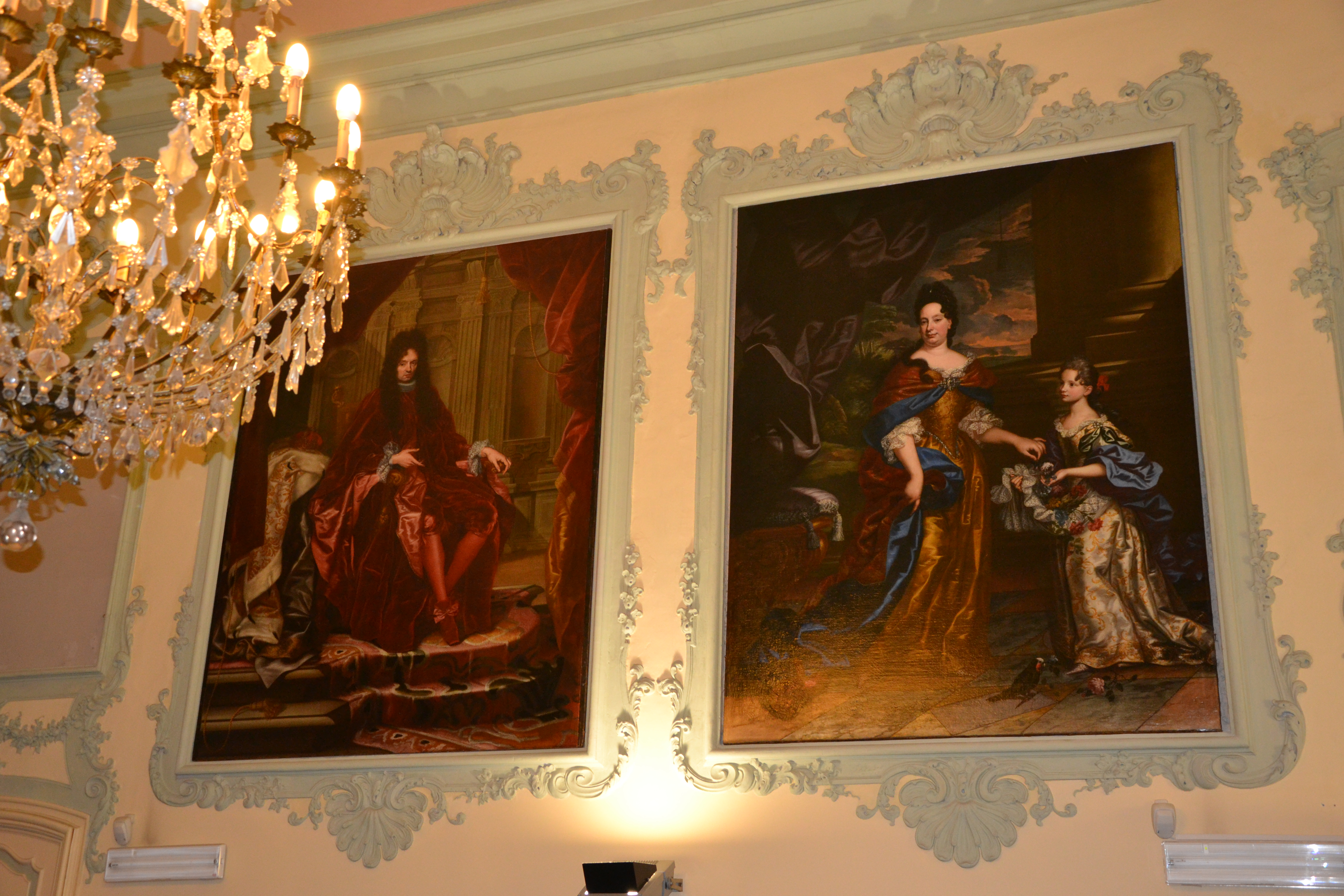 Palazzo Gio Francesco Balbi, via Balbi al civico 2, Genova, Ritratto del Doge Giovanni Battista Cattaneo della Volta. eseguito da Gio Enrico Vaymer